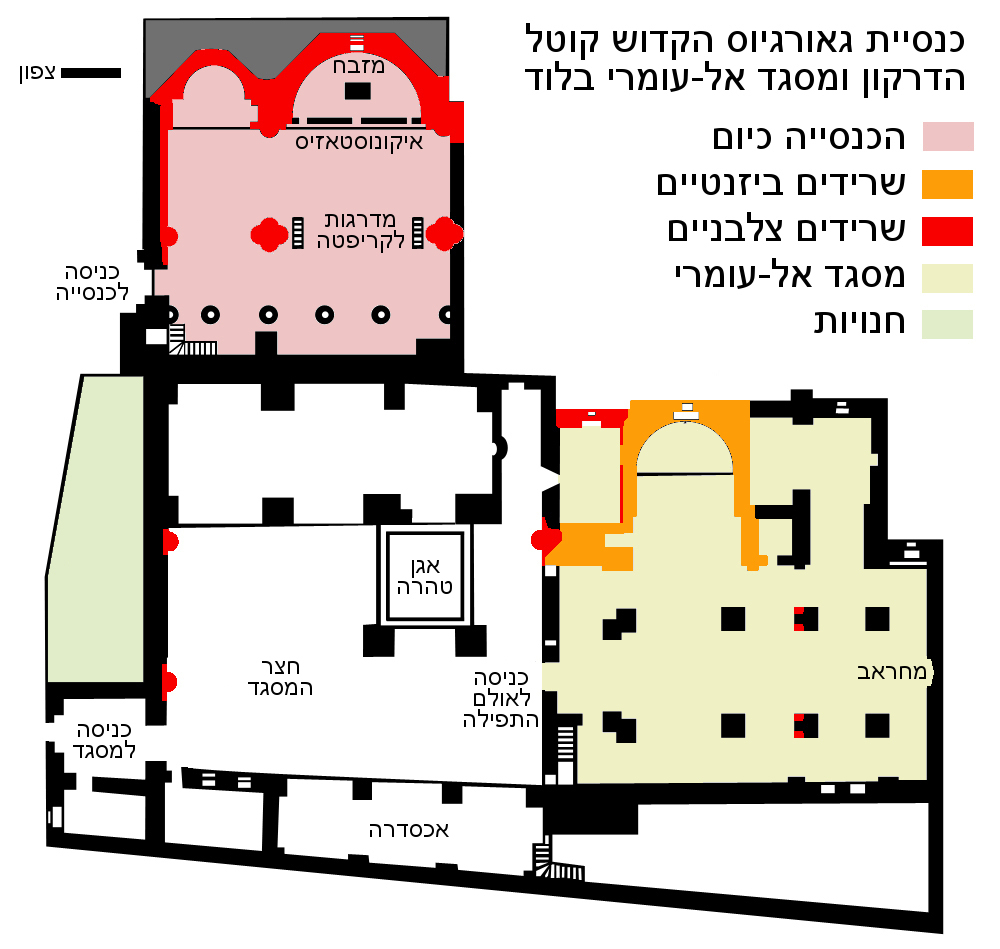 מפת כנסיית גאורגיוס הקדוש, לוד